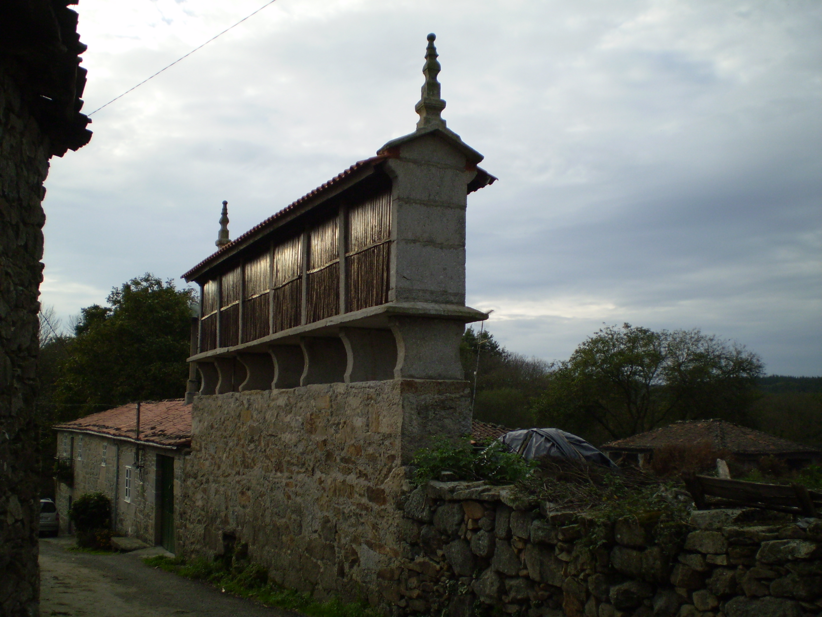 Hórreo da casa do Cairés en Fondevila (Antas de Ulla)